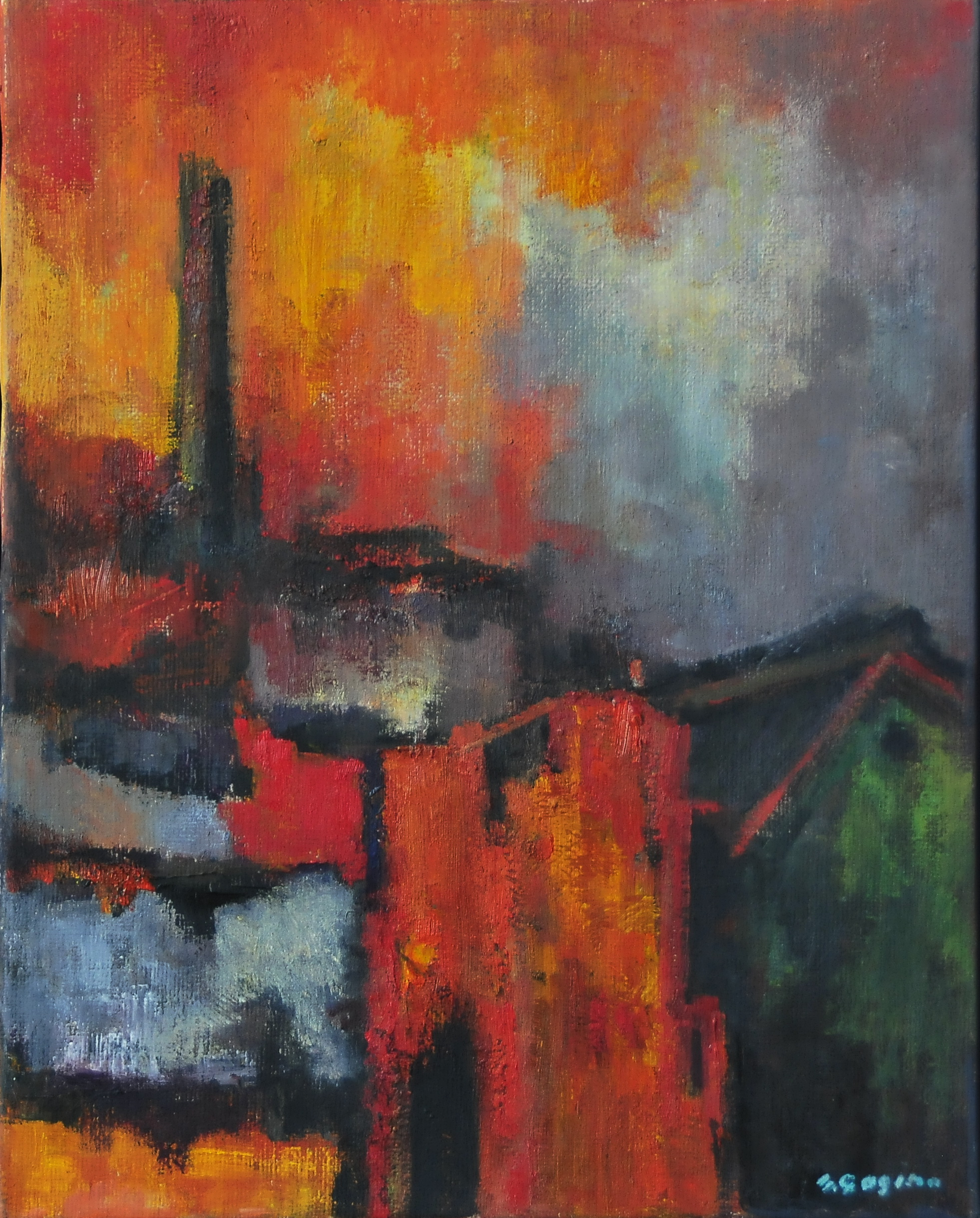 Giovanni Gagino, Fabbriche (2010, olio su tela cm 40x50)